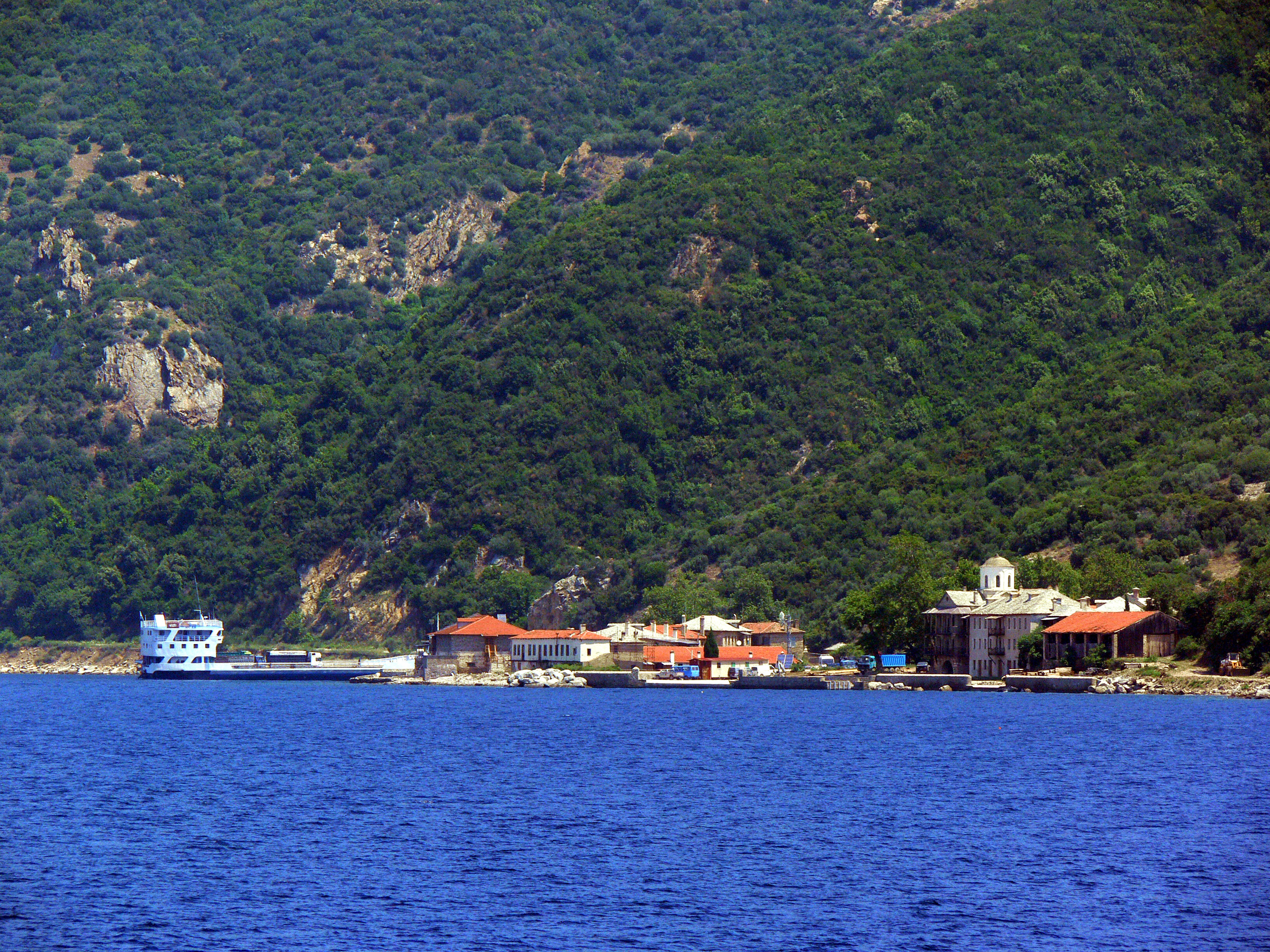 Hafen Dafni